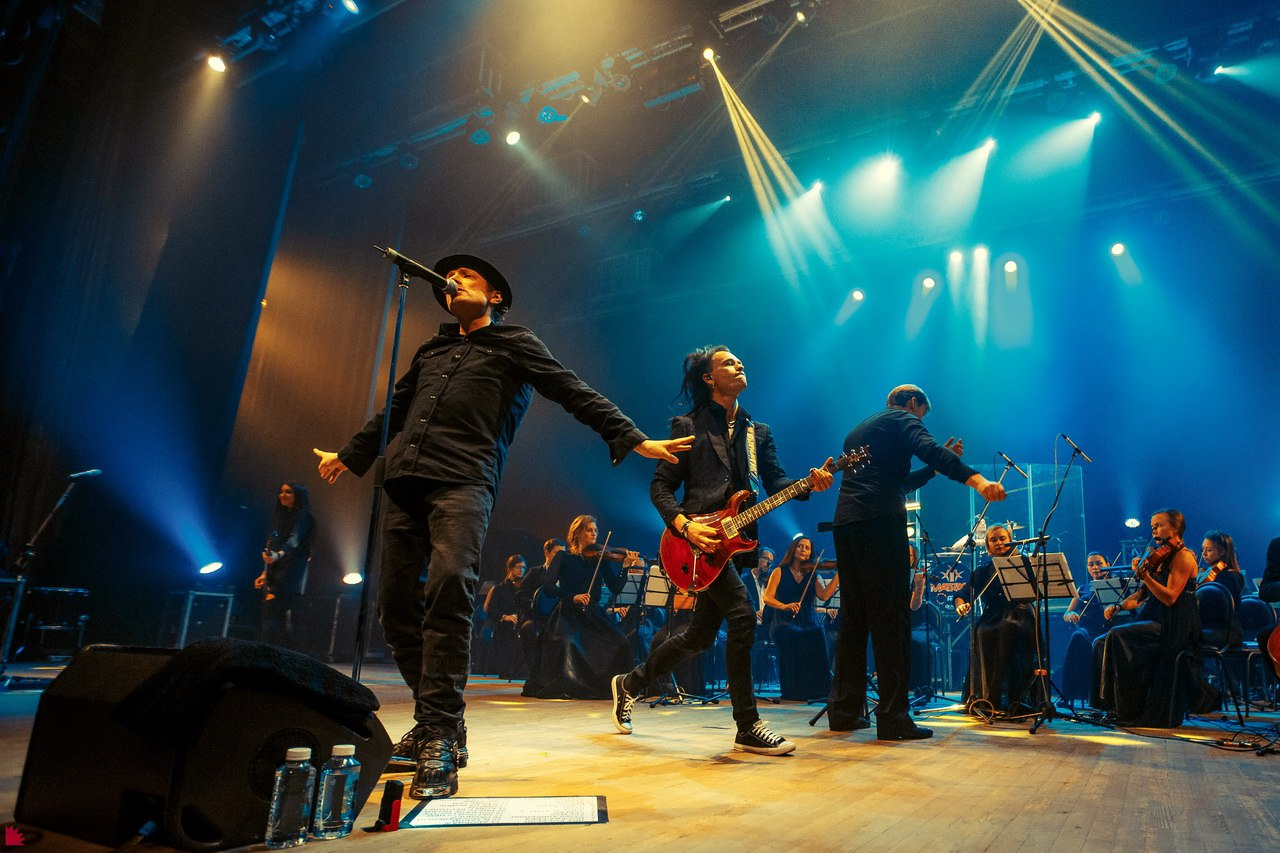 Выступление The Matrixx в Екатеринбурге, 2017 г.